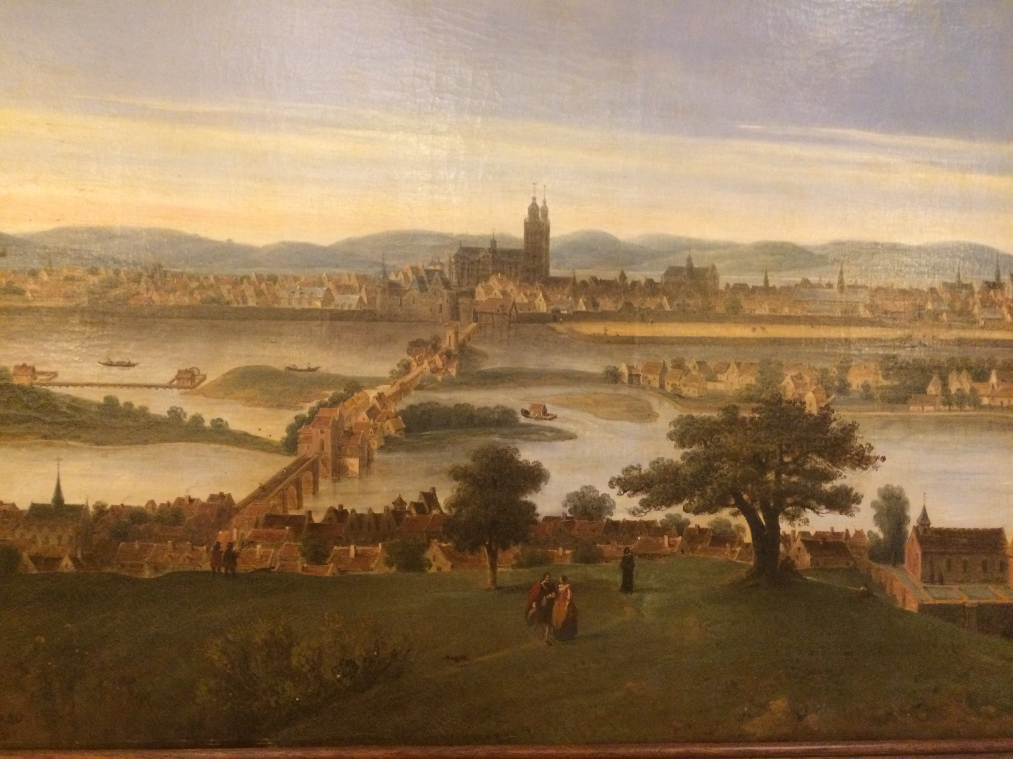 Peintre : Jacques-Auguste Regnier - Sujet/inspiration : Vue panoramique de Tours en 1630, peinte sur la foi d'une gravure néerlandaise de Claes Jansz Visscher, où l'on reconnait le pont d'Eudes assis sur l'île Saint-Jacques et contrôlé par le château de Tours, à l'ombre de la nouvelle cathédrale Saint Gatien - Lieu de gardiennage : entrée d'honneur du Conseil départemental d'Indre-et-Loire (Tours)